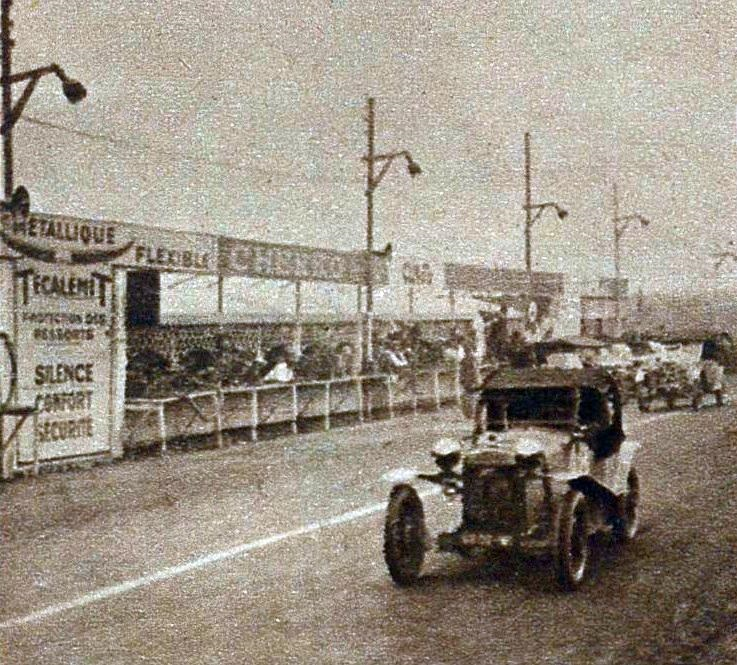 Voitures capotées aux 24 Heures du Mans 1926.